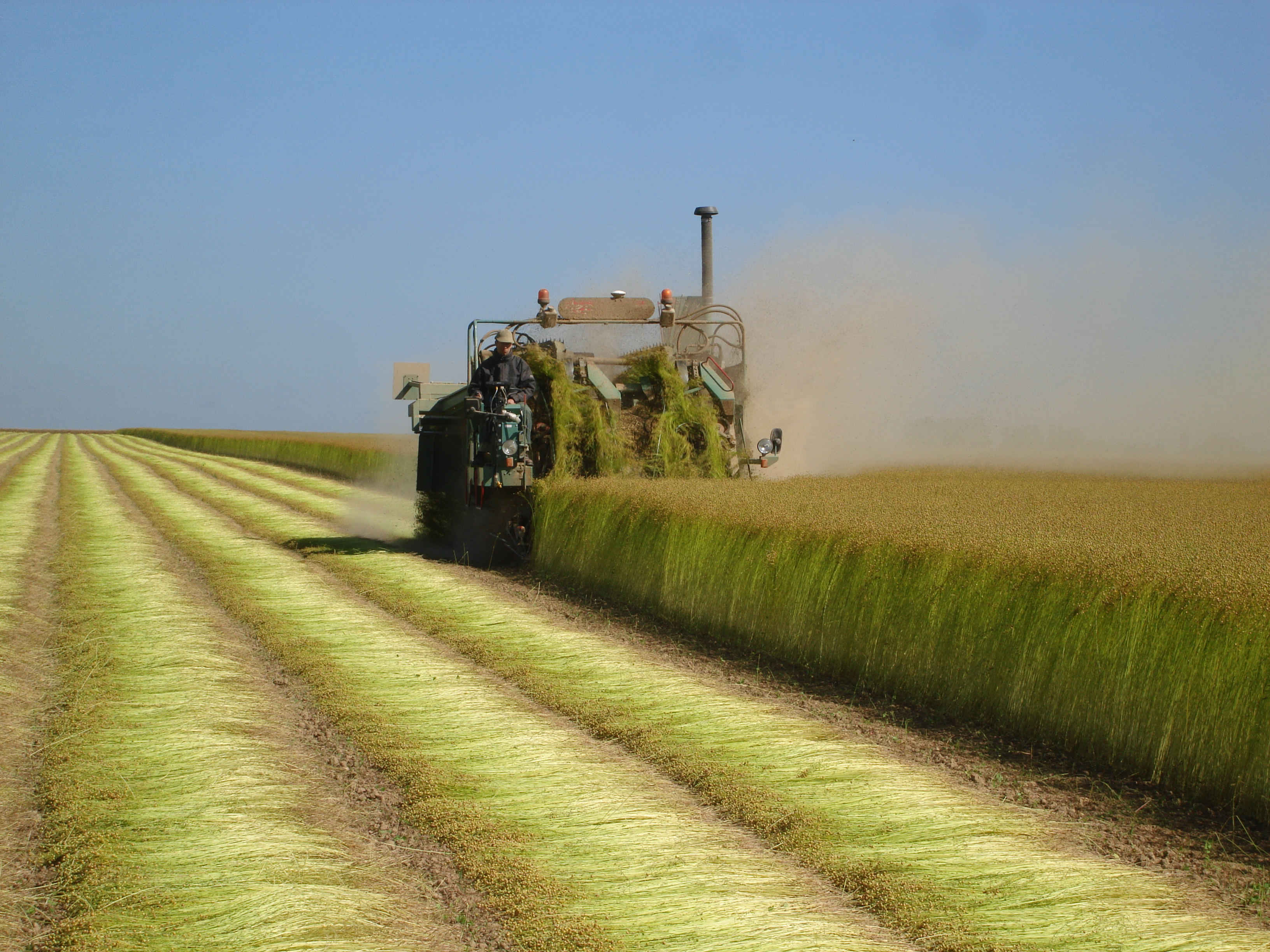 L'arrachage du lin.